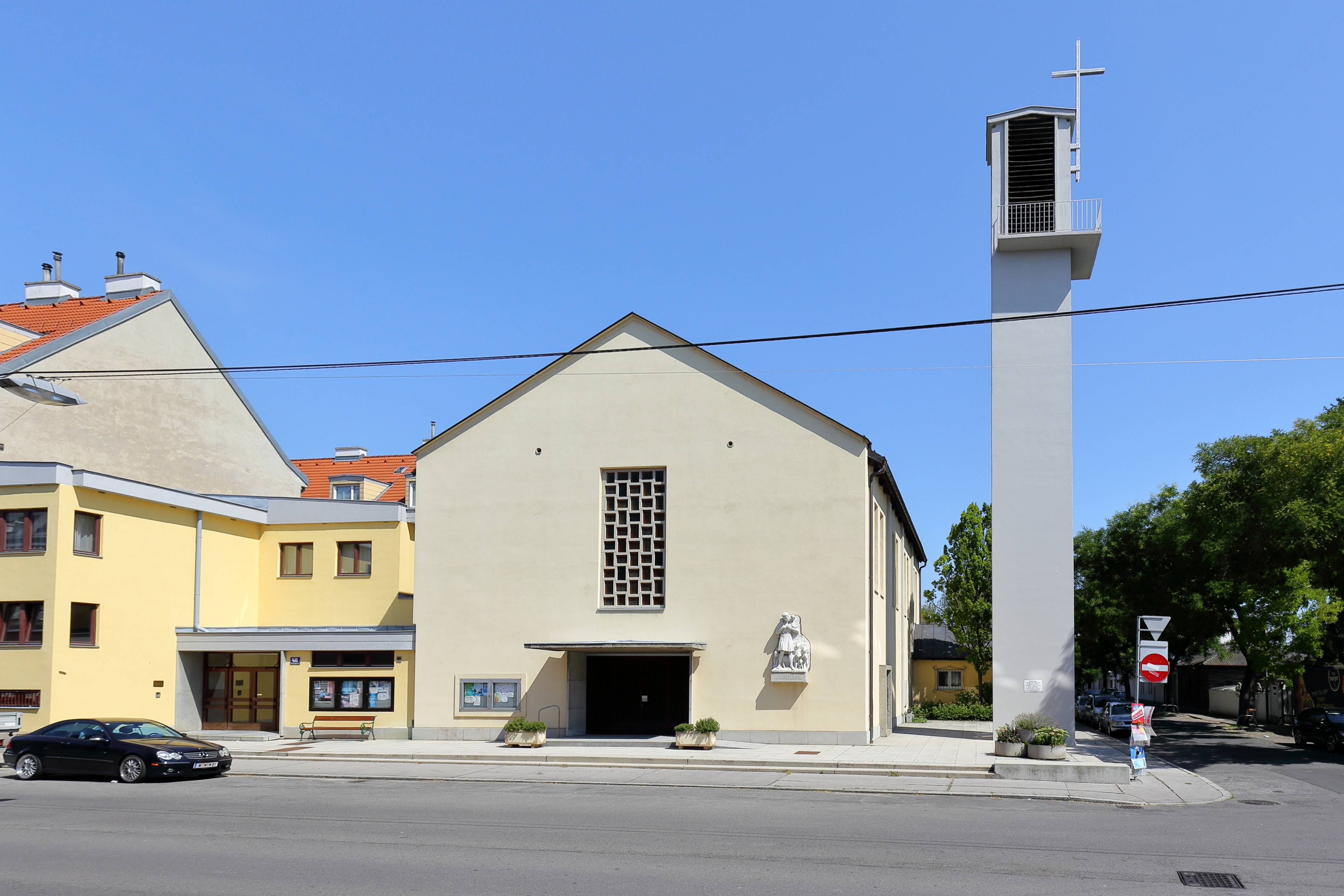 Pfarrkirche hl. Martin in Siebenhirten, ein Ortsteil des 23. Wiener Gemeindebezirkes Liesing. Nachdem die Vorgängerkirche, erbaut 1721, am 23. August 1944 niedergebombt wurde, errichtete man nach Plänen von Mag. arch. Ing. Herbert Schmid, Ing. Otto Rinder und Ing. Otto Sobetzky ab 1954 die neue Kirche mit einem 24 m hohen freistehenden Glockenturm, die am 6. Nov. 1955 geweiht wurde. Die Steinplastik „der gute Hirte“ mit der Inschrift: „Ich bin der gute Hirte. Ich kenne die meinen und die meinen kennen mich.“ rechts des Kirchenportals ist ein Werk des akad. Bildhauers Bohdan Zarovsky. Das Pfarrheim links der Kirche wurde von 1983 bis 1985 nach Plänen von Herbert Schmid errichtet.